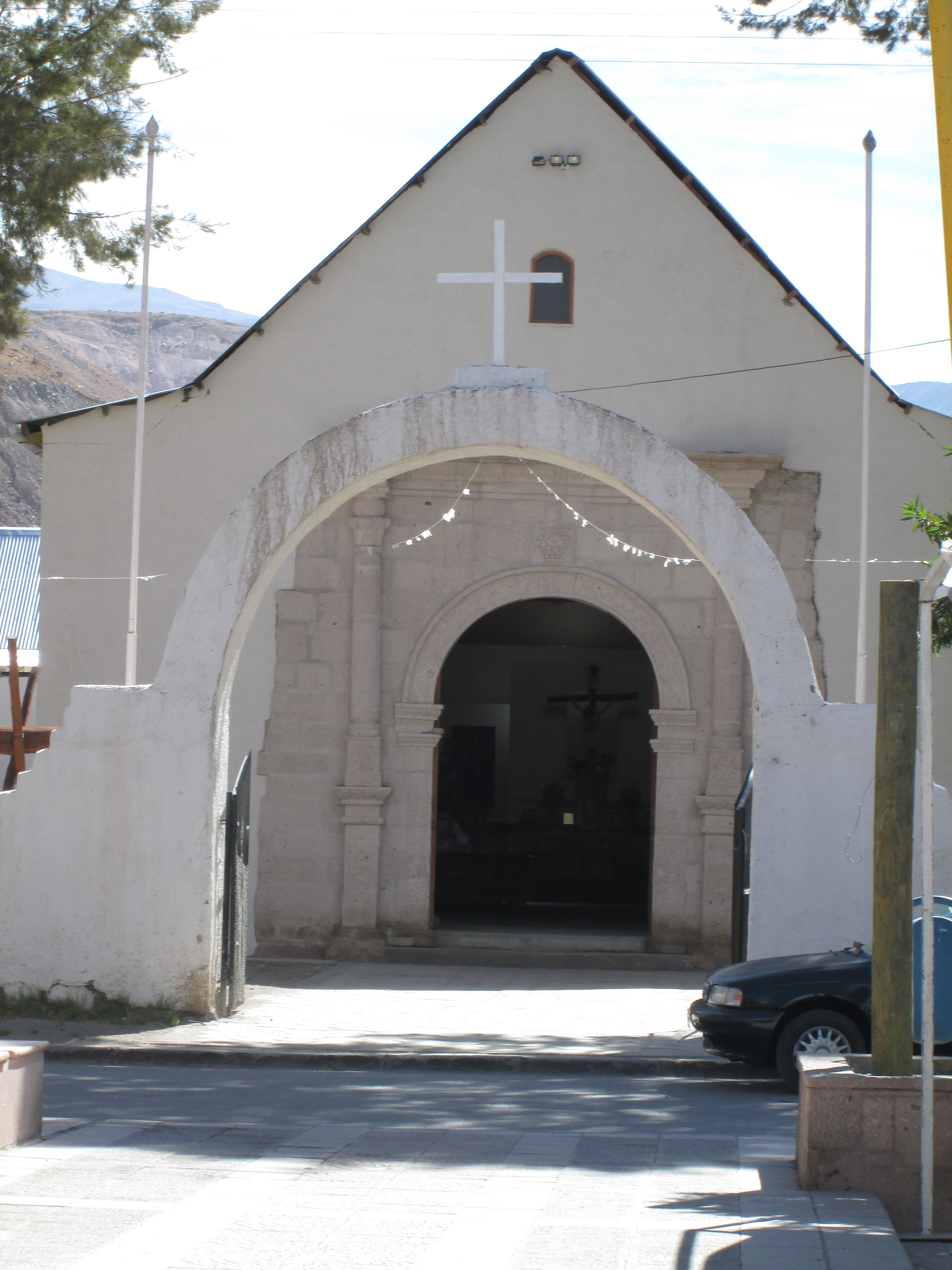 UBICADA EN EL PUEBLO DE CAMIÑA This is a photo of a national monument in Chile: 2056